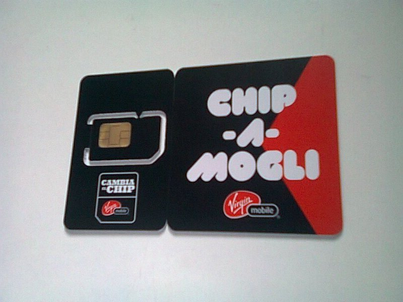 Una tarjeta Sim Card de la compañía de telefonía celular Virgin Mobile Chile.